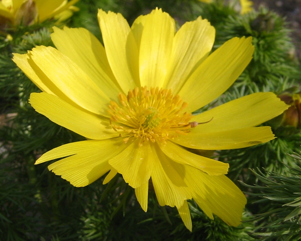 Adonis vernalis; Botanical Garden, Vienna, Austria